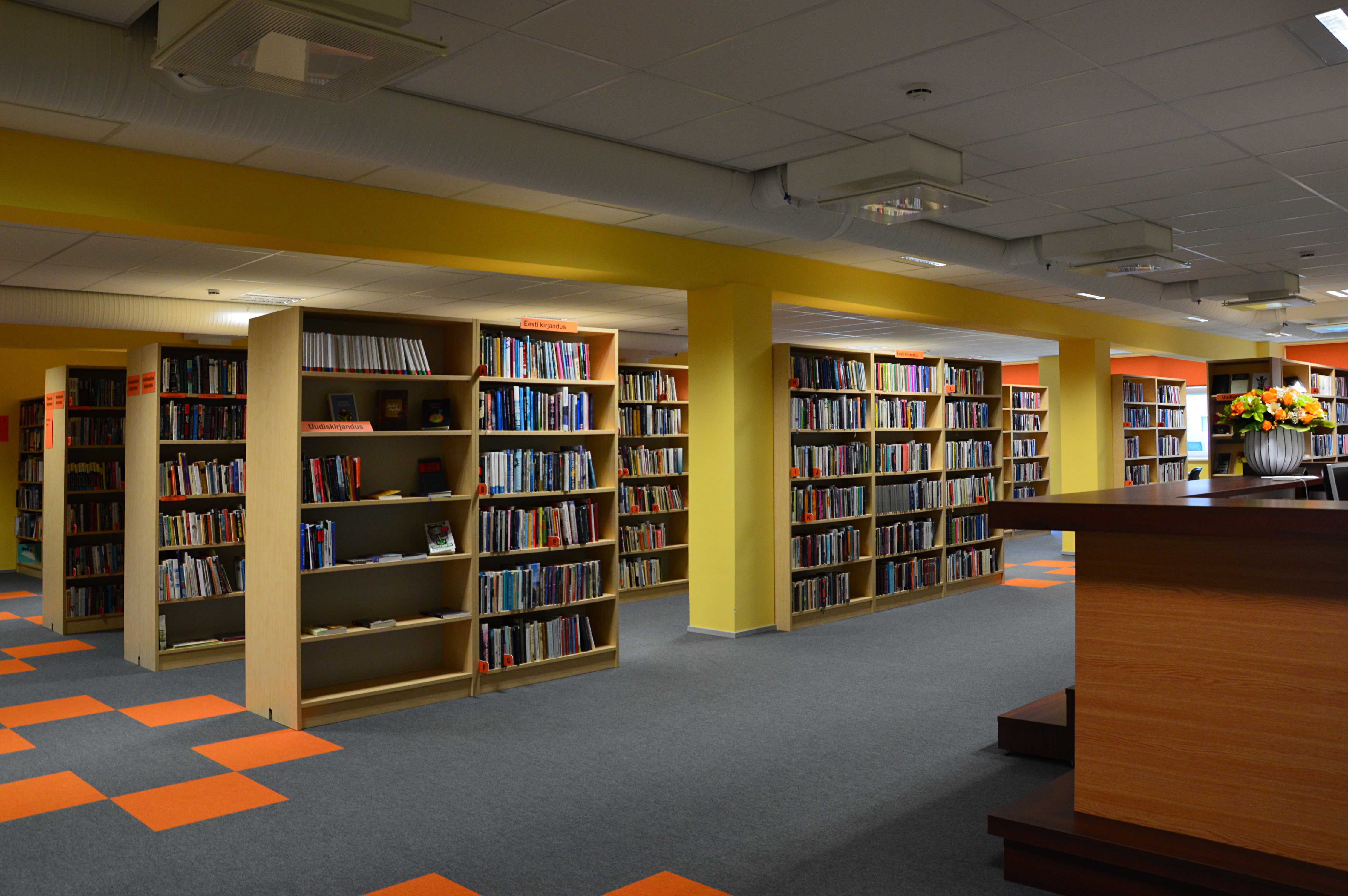 Kose raamatukogu interjöör.